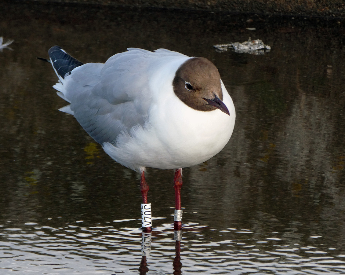 Vuxen Skrattmås i sommardräkt ringmärkt i Danmark.